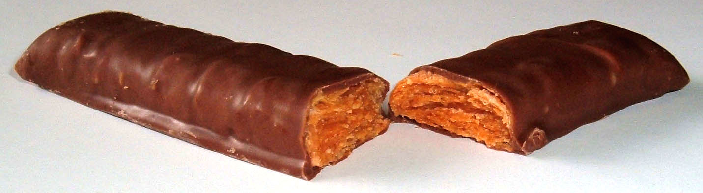 ButterfingerPurchased Feb. 2005